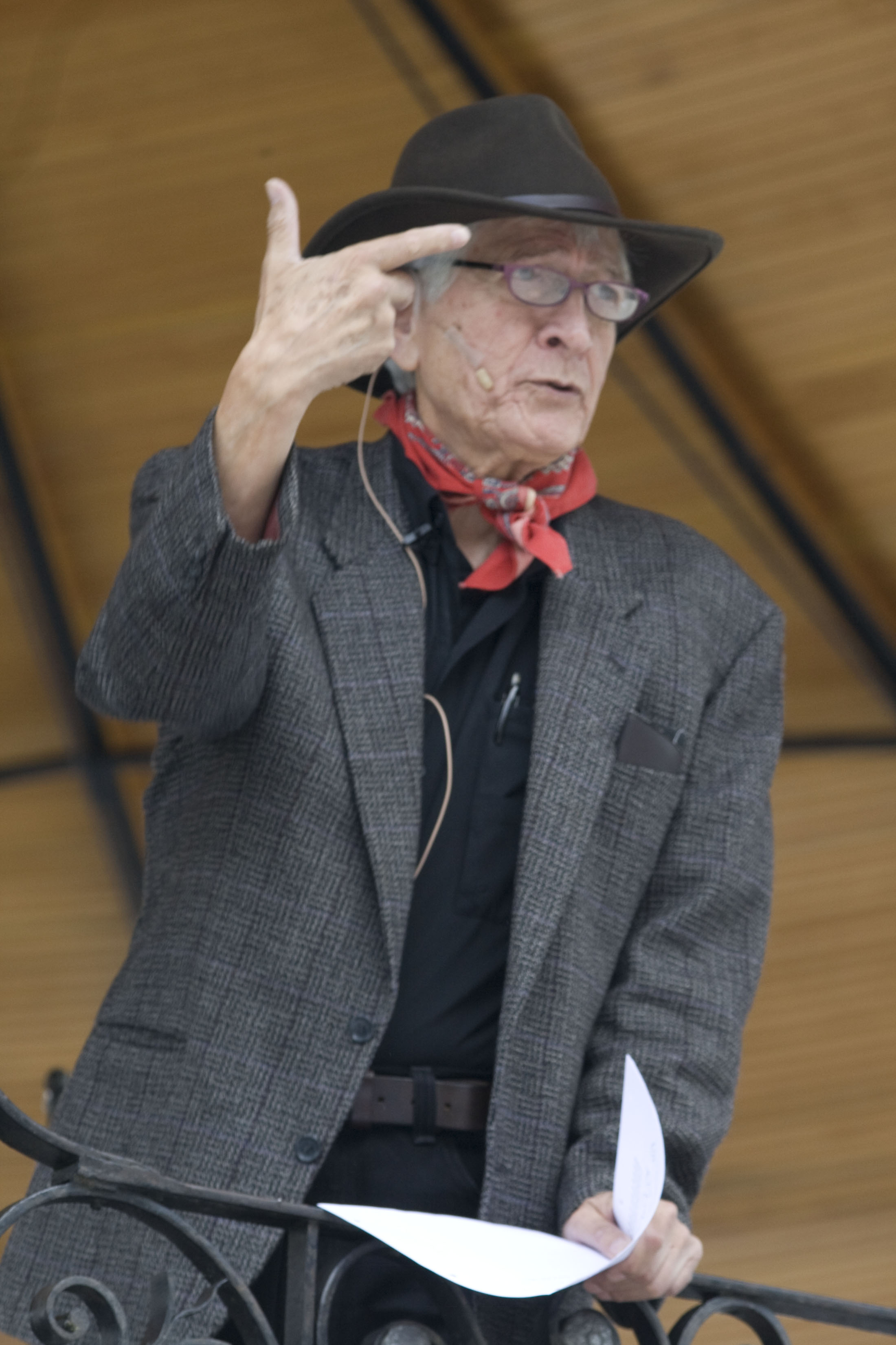 Domingo 22 de Junio 2014 . La Secretaria de Cultura realizo el la Alameda central la Fiesta Callejera El Gran Cocodrilo Homenaje al poeta Efrain Huerta donde el hijo del vate David Huerta el Secretario de Cultura del Distrito Federal Eduardo Vazquez Martin y los actores Carlos Bracho Jose de Tavira leyeron poemas.